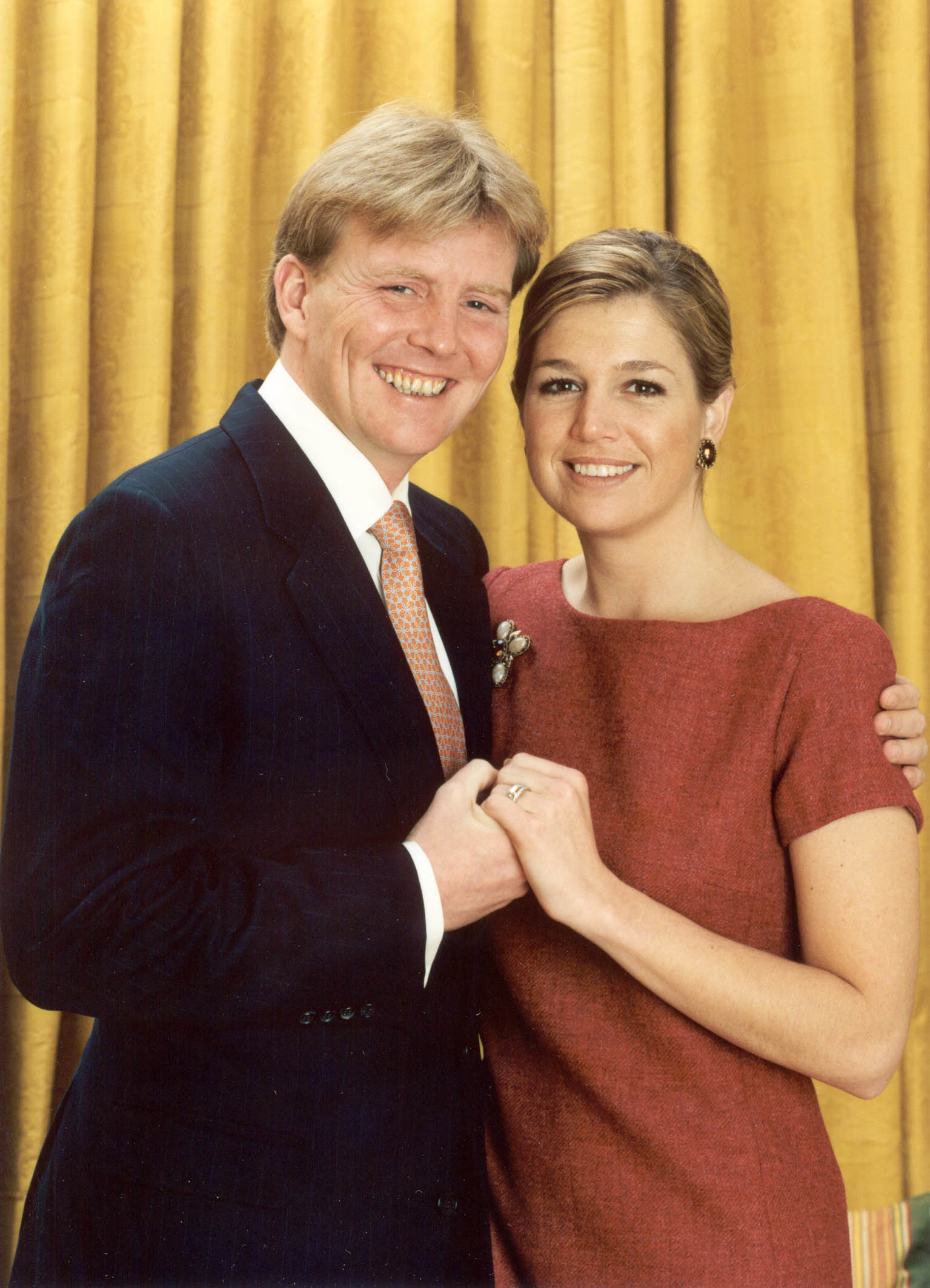 Verlovingsportret van de Prins van Oranje en Máxima Zorreguieta. 2001.